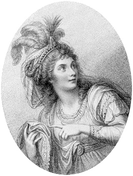 Anne Merry (née Brunton)